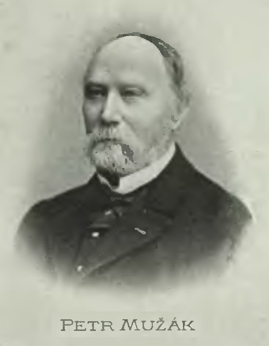 Portrét – Petr Mužák (1821-1892), Český středoškolský profesor.